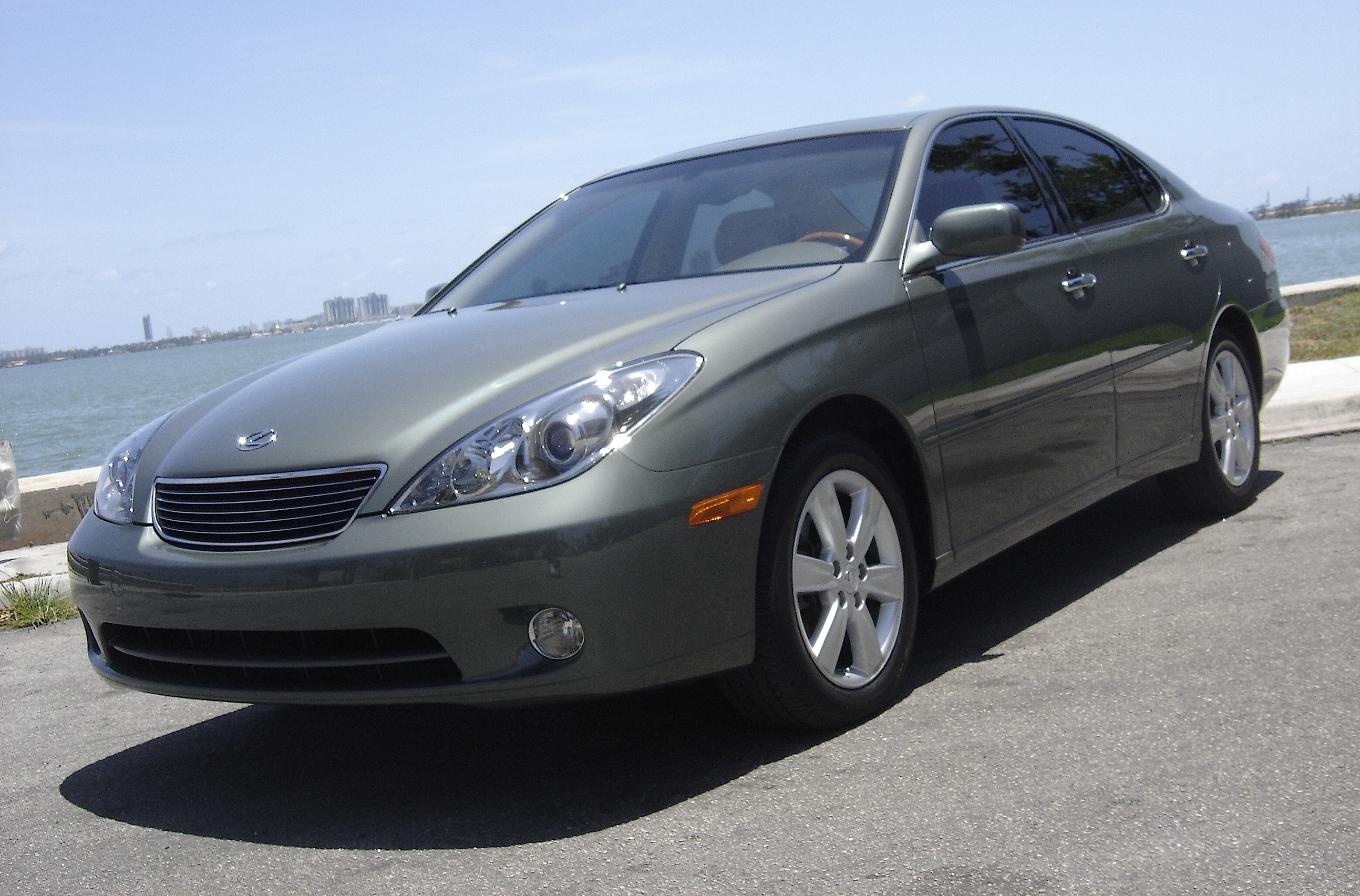 2006 Lexus ES